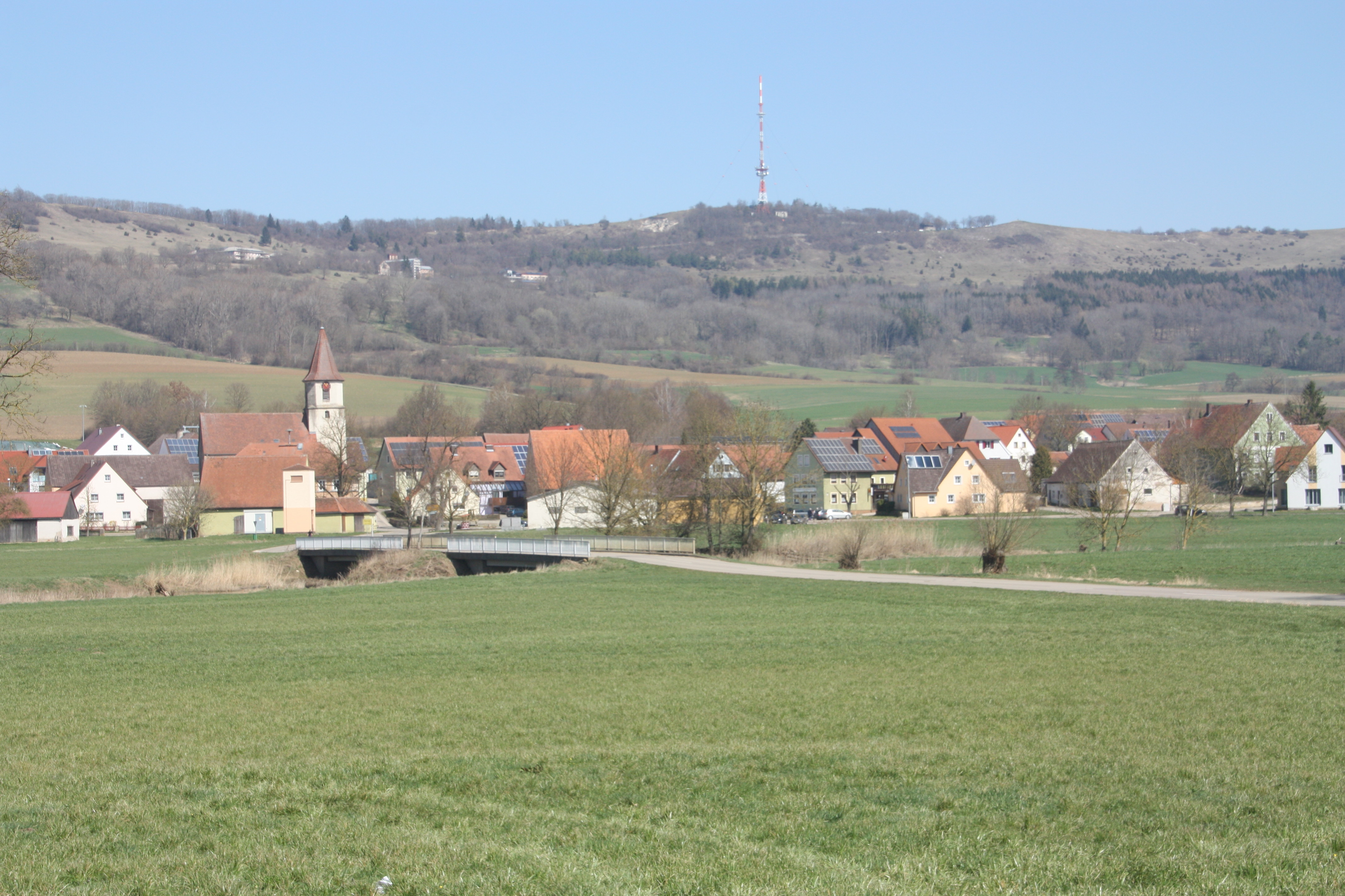 Gerolfingen mit Hesselberg